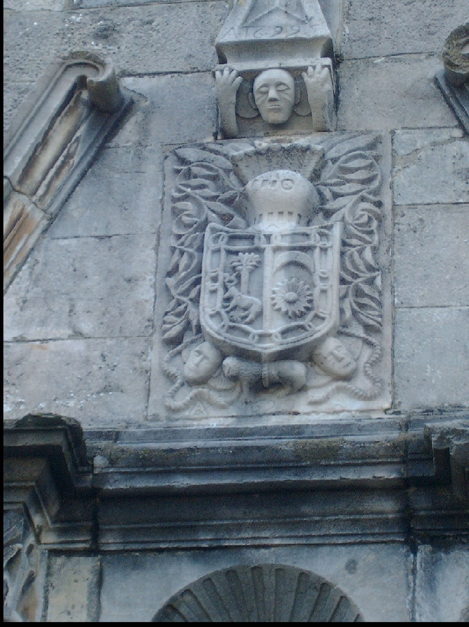 El escudo que luve sobre la portada de la iglesia de San Nicolás de Burguete corresponde a la familia Orozm que fue quien en 1699 costeo la fachada de la iglesia. Sin embargo, ese escudo es el que actualmente utiliza la villa